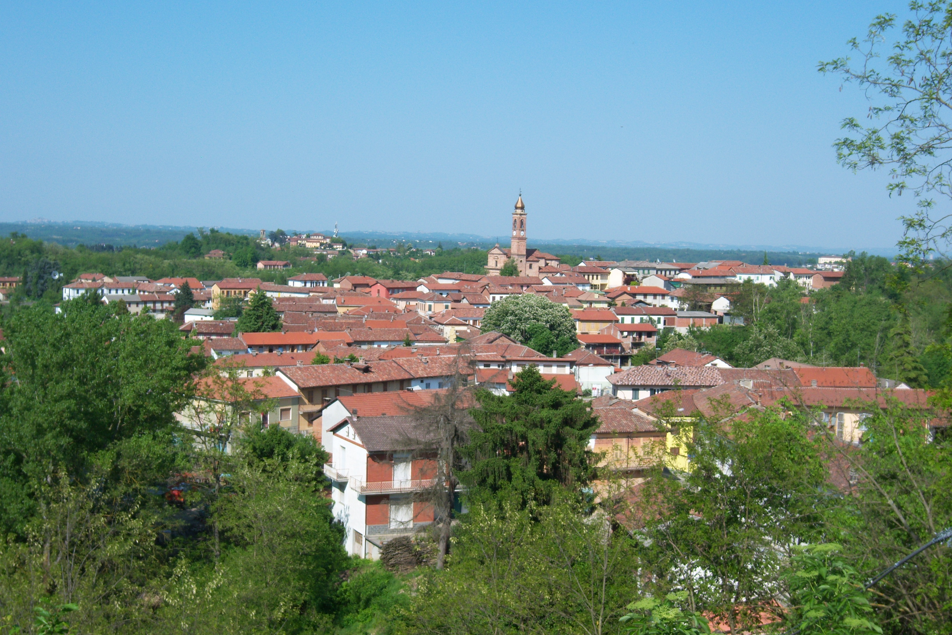 Montemarzo visto dal Bricco Simone